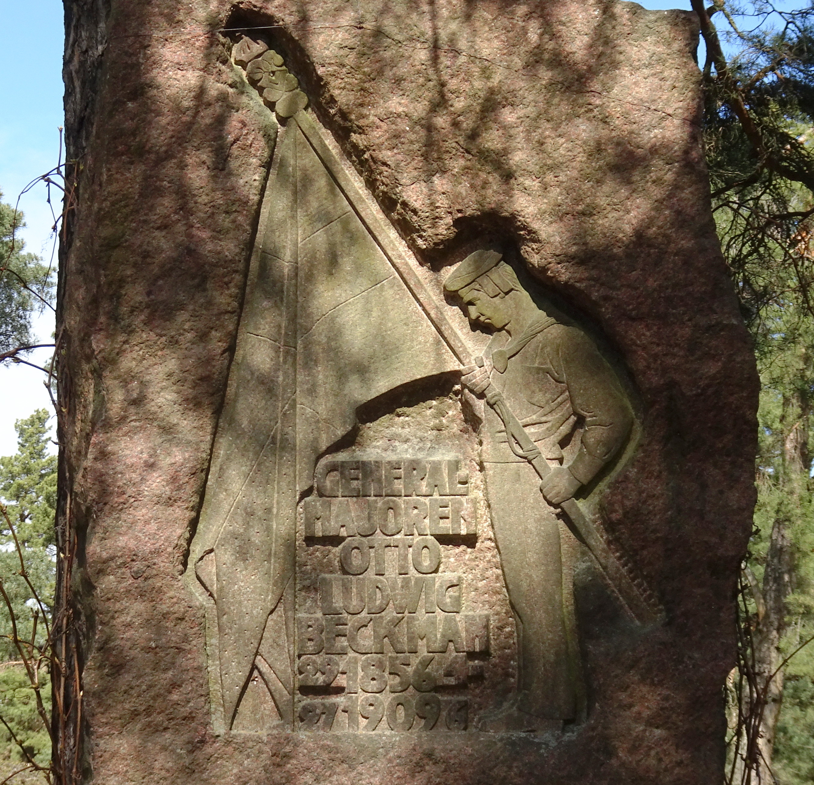 Otto Ludvig Beckmans grav på Norra begravningsplatsen (detalj)